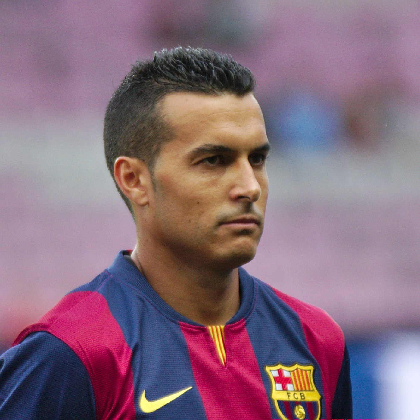 Barça - Napoli - 20140806 - Pedro Rodriguez